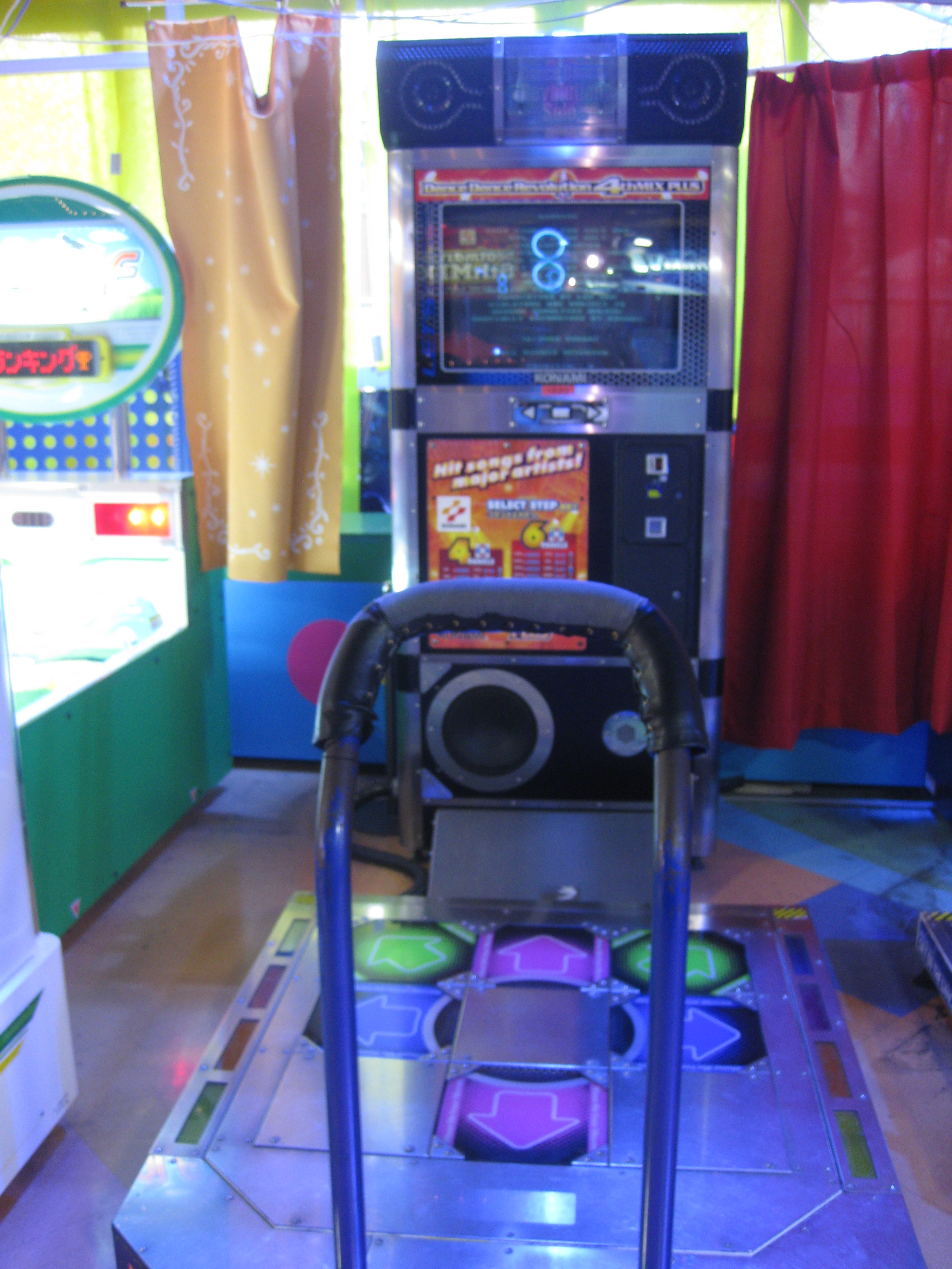 「ダンスダンスレボリューション」のSOLO用筐体の参考写真。後楽園遊園地のゲーセンにて自己撮影。